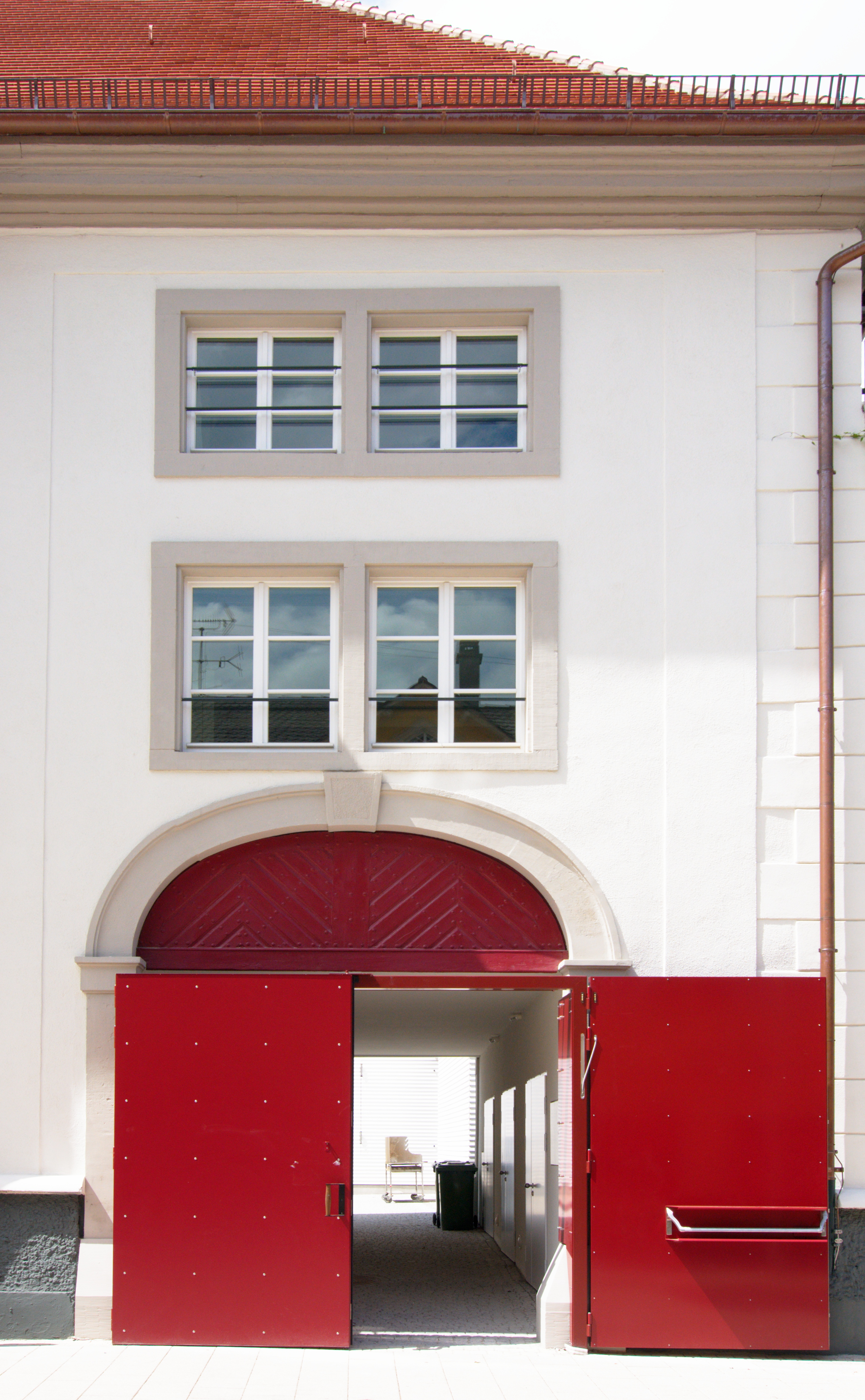 MIK Museum Information Kunst in Ludwigsburg, Eingang zum Innenhof.